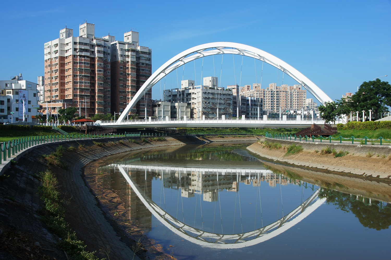 中文（台灣）: 高雄市楠梓區益群橋。